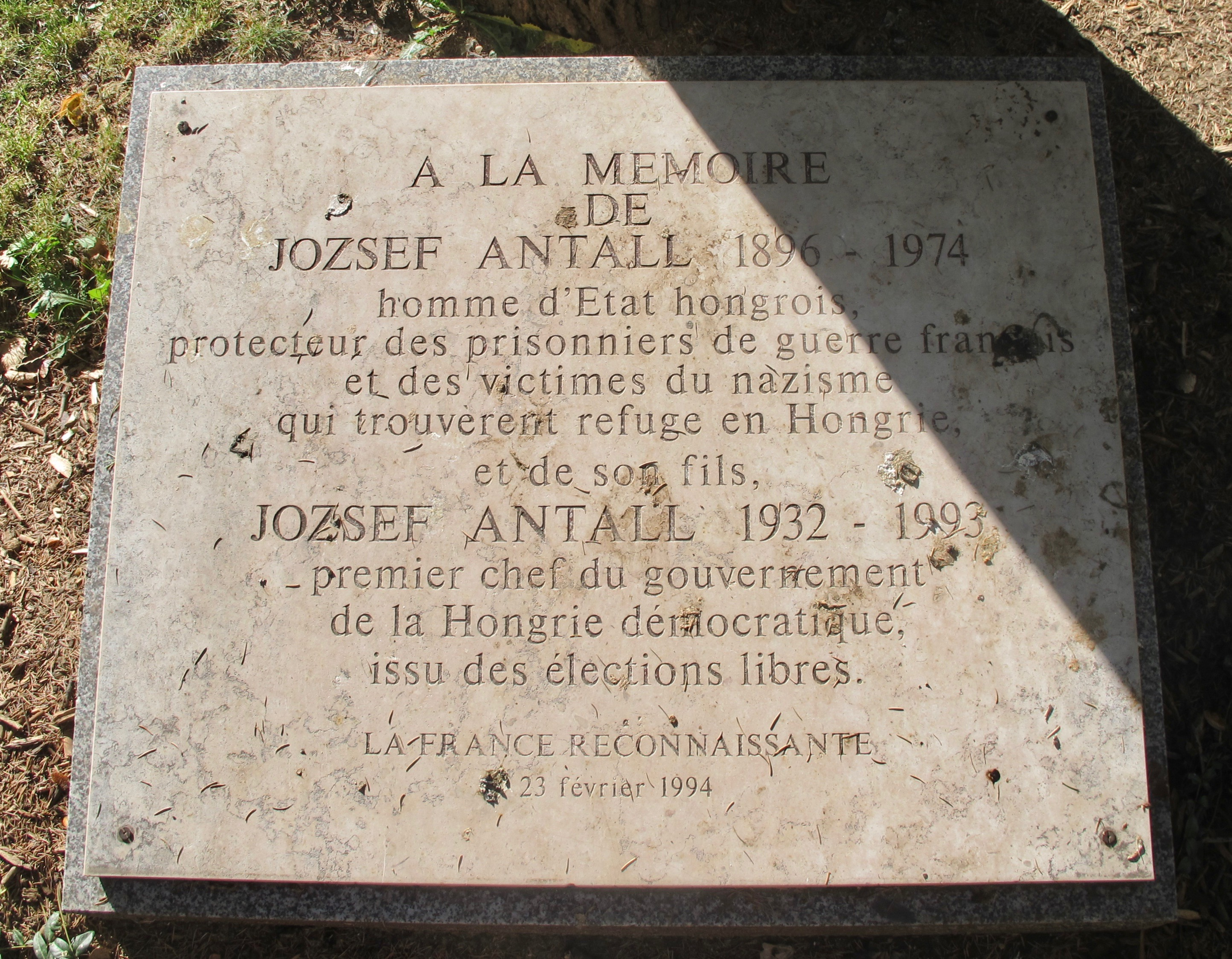 Plaque en hommage aux hommes politiques hongrois József Antall (père et fils), square Alfred-Capus (Paris, 16e).